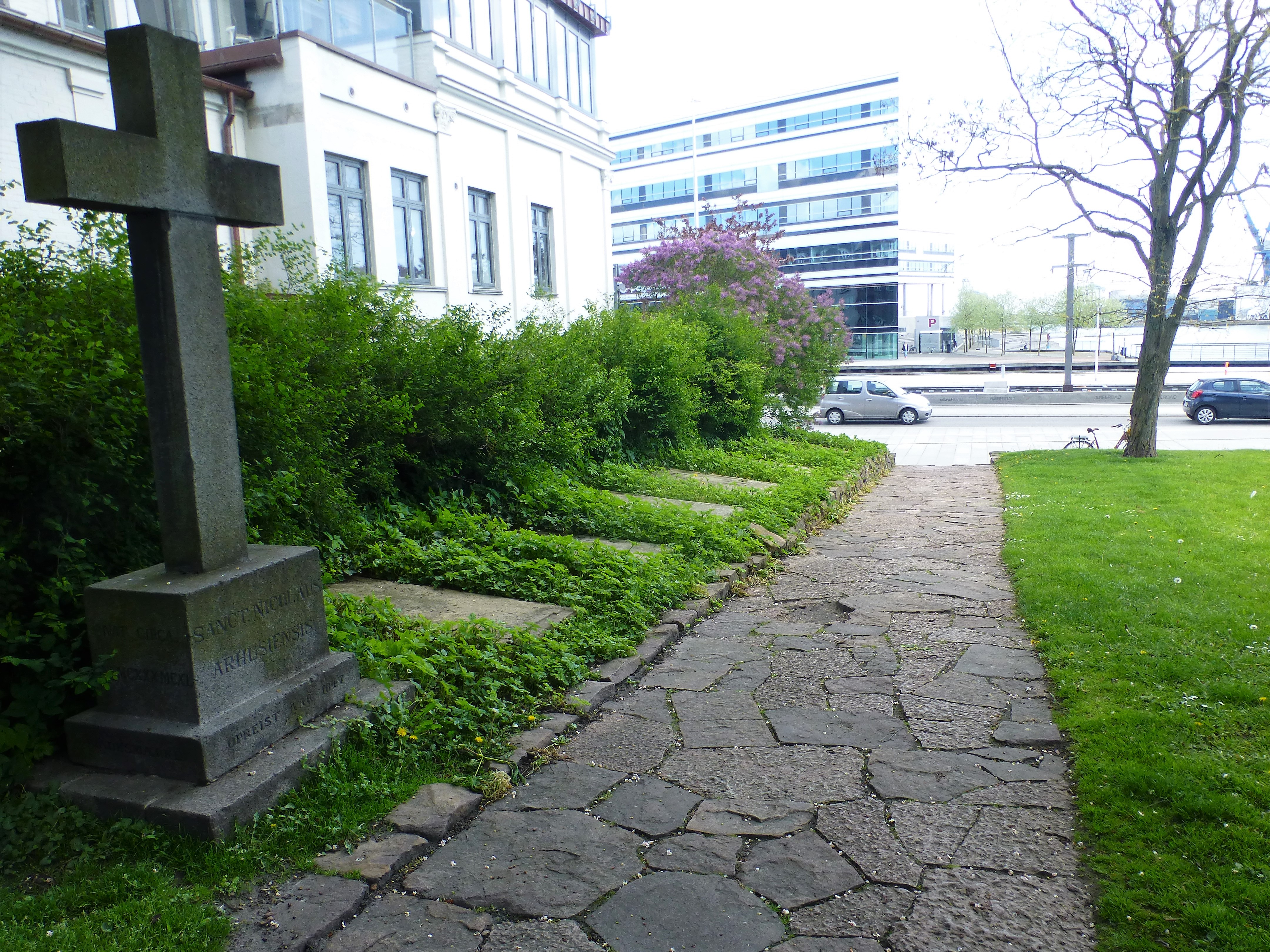 Sankt Olufkors og gravsten